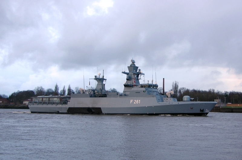 Die Korvette MAGDEBURG (130/02) auf der Weser in Höhe Bremen-Farge/Berne am Dienstag, dem 04. März 2008, um 17:46 Uhr MEZ.